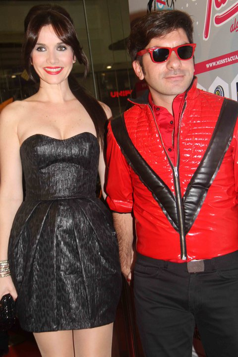 martin sastre y natalia oreiro en la avant premier de miss tacuarembo